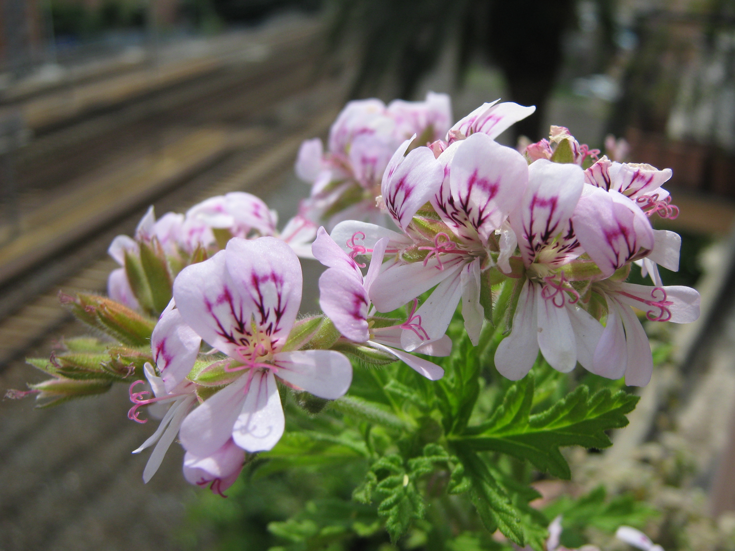 Pelargonium graveolens